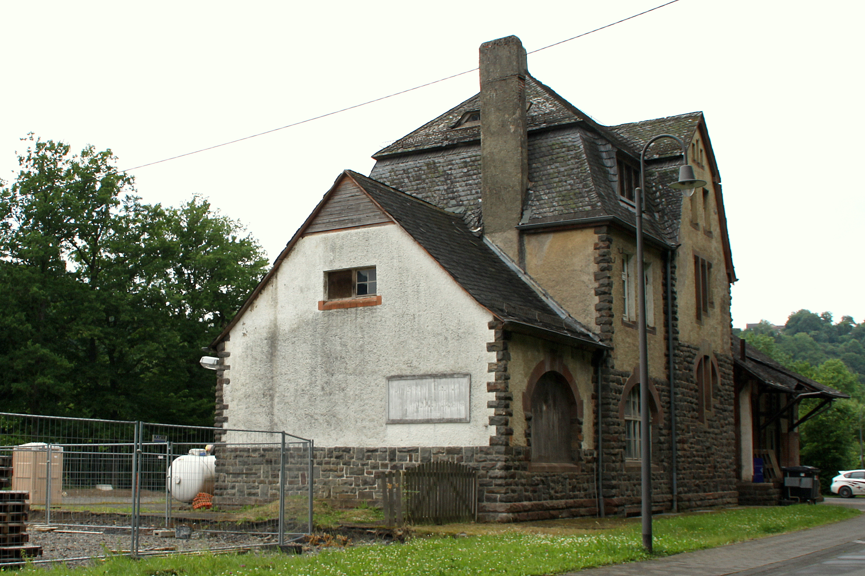 Déi freier Gare zu Waxweiler